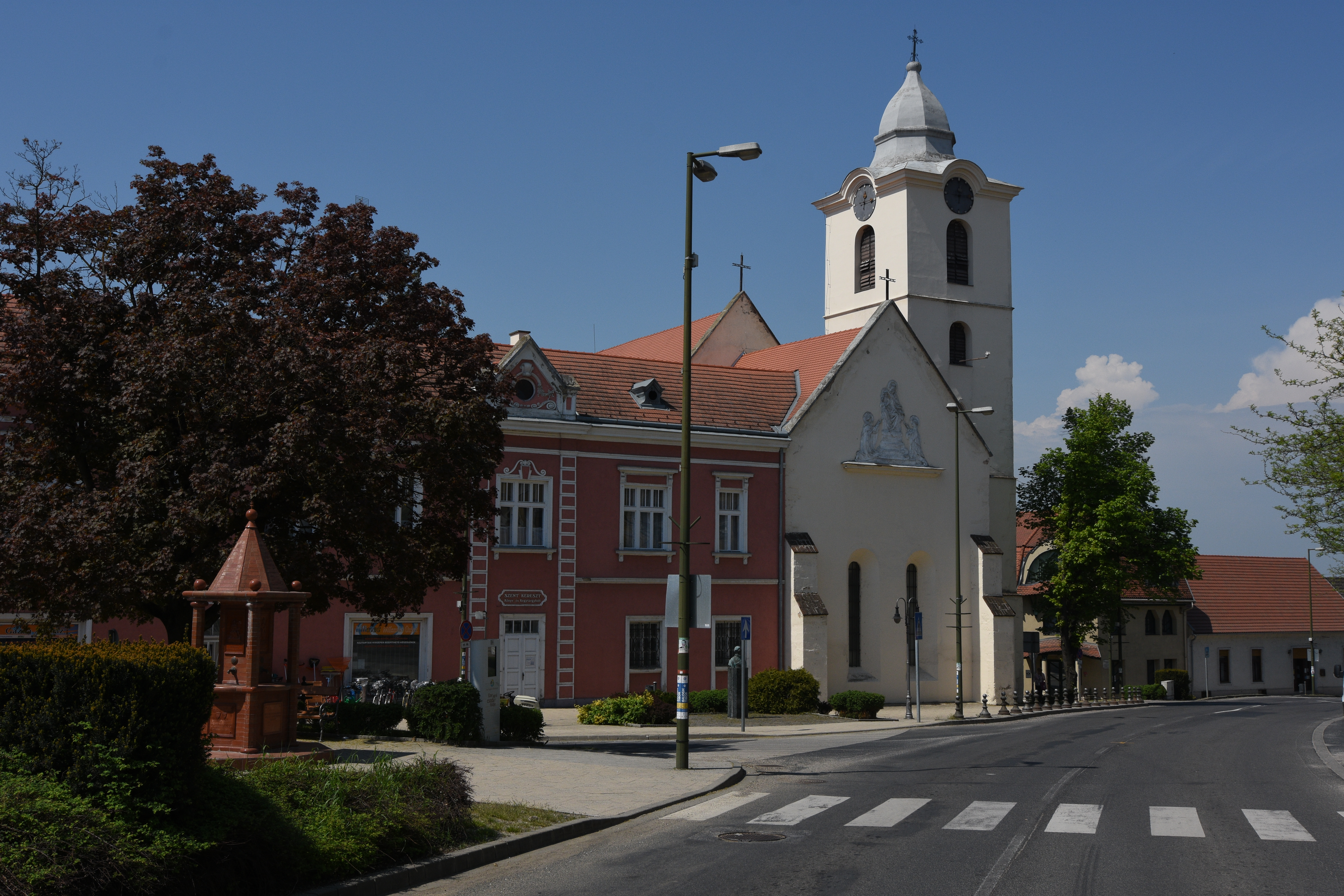 Holy Cross church in Vasvár TemplonDomonkos rendház, azonosító: 9489 törzsszám: 8126 és Szent Kereszt Felmagasztalása, volt domonkos templom, gótikus, 15. sz. Átalakíttatta barokk stílusban 1689-ben Széchenyi György, azonosító: 9491 (törzsszám: 8127)